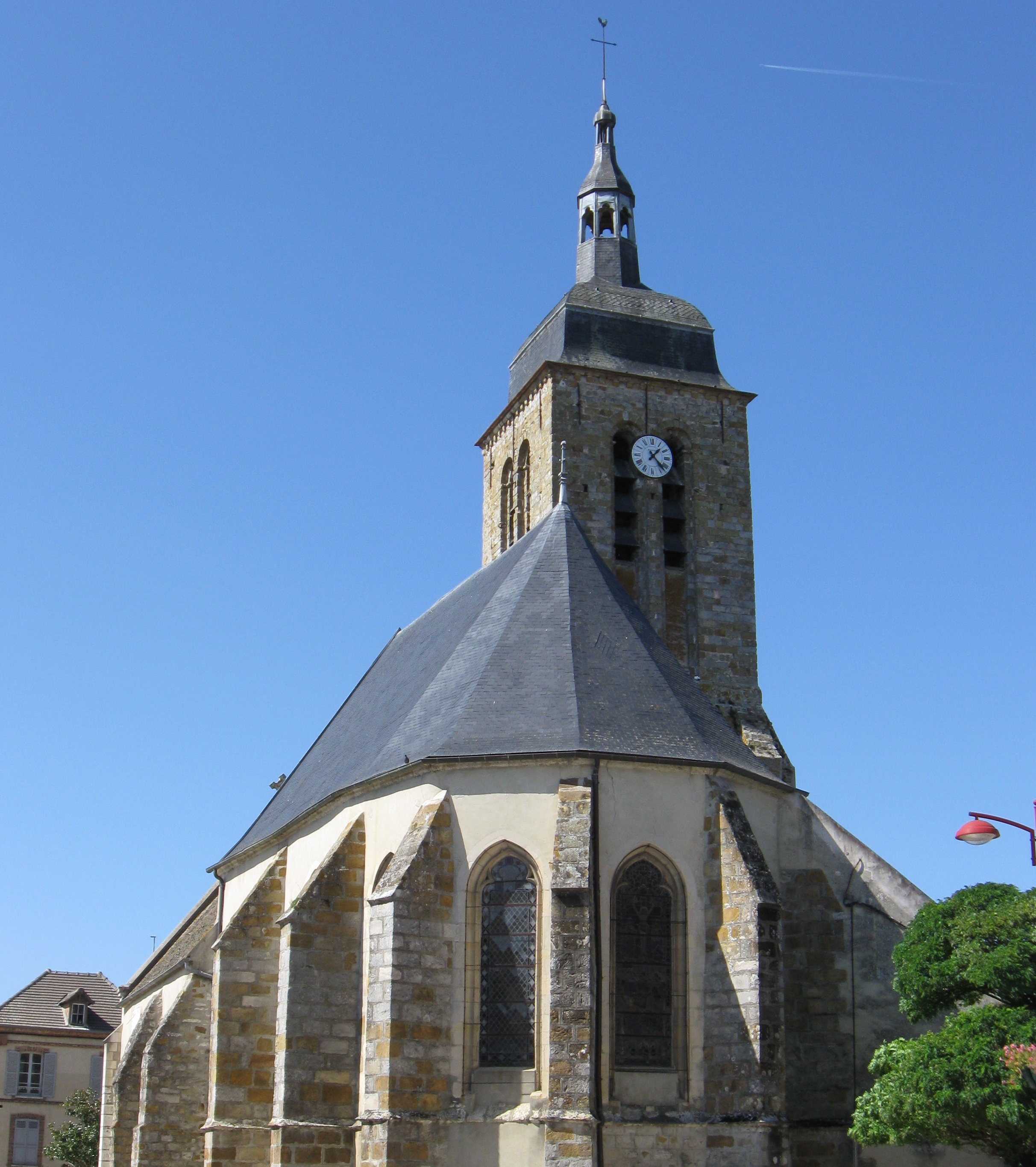 Église Sainte-Geneviève de Montigny-Lencoup. (Seine-et-Marne, région Île-de-France).